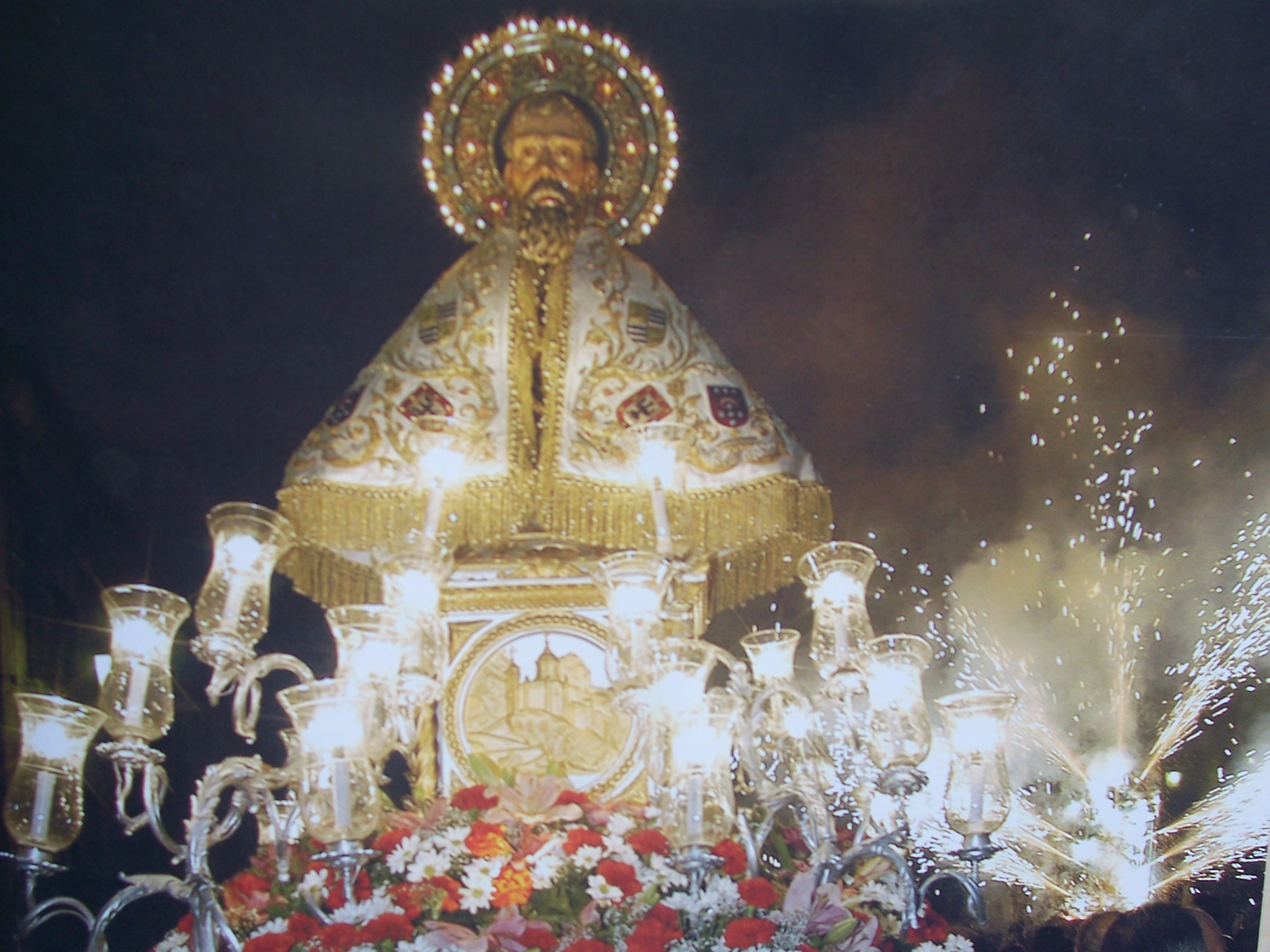 San saturi (Soria)